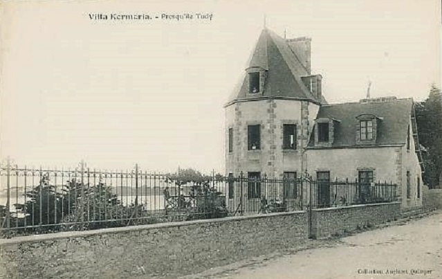 Île-Tudy : la villa Kermaria, ancienne propriété du couturier Paul Poiret, qui y organisa des fêtes somptueuses (carte postale début XXème siècle, collection Anglaret)